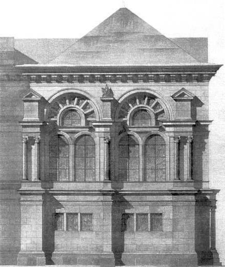 Aquarelle de la Chapelle des Évêques (circa 1530) de la Cathédrale Saint-Étienne de Toul